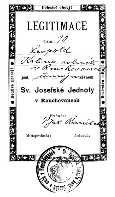 Legitimace Sv. Josefské Jednoty v Rouchovanech